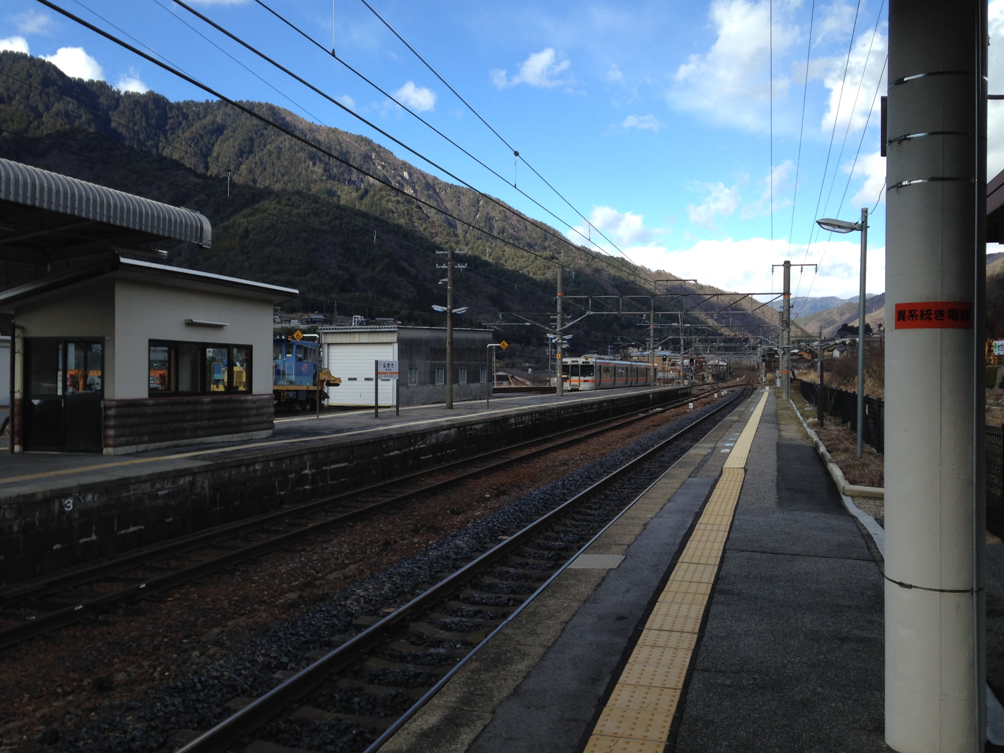 南木曽駅ホーム(奥は十二兼方面)